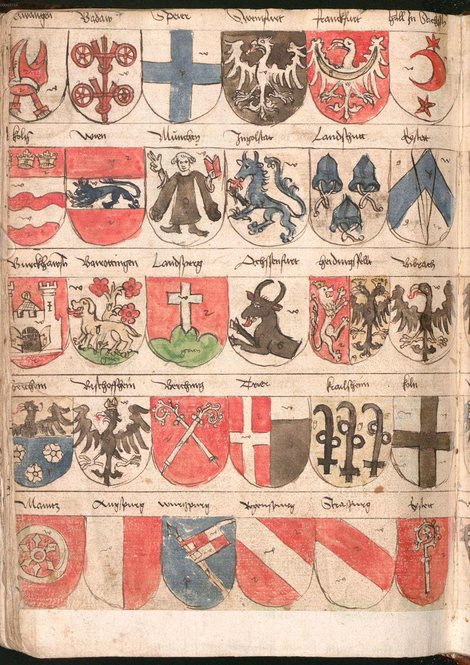 „Wernigeroder (Schaffhausensches) Wappenbuch“; Süddeutschland 4. Viertel 15. Jh. Bayerische Staatsbibliothek München, Cod.icon. 308 n